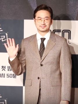 29일 오후 서울시 영등포구 여의도동 콘래드 서울 호텔에서 OCN 새 토일 오리지널 ‘본 대로 말하라’의 제작발표회가 열려 배우 장혁, 최수영, 진서연, 장현성,류승수가 참석해 포토타임을 갖고 있다.